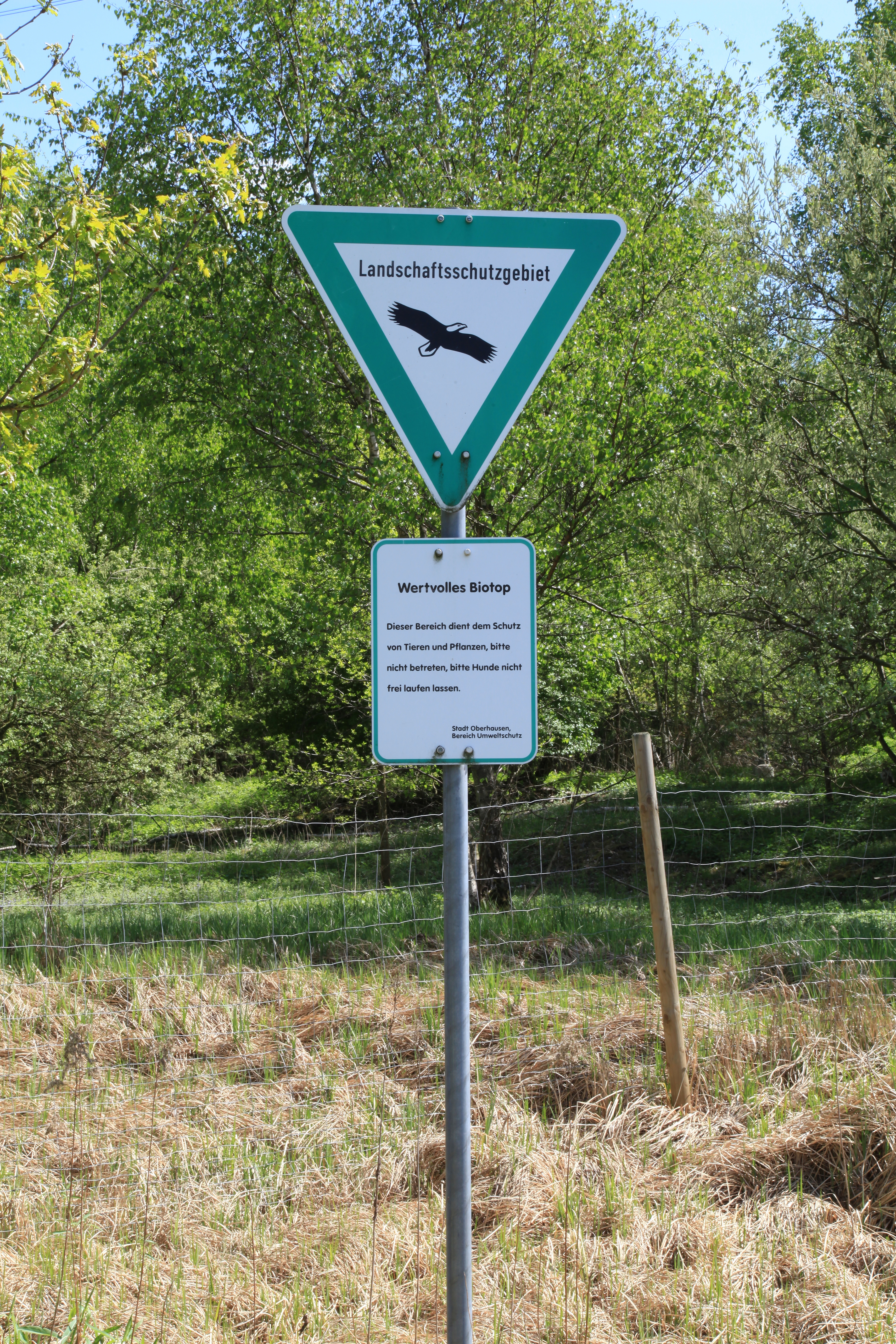 Brache Vondern in Oberhausen